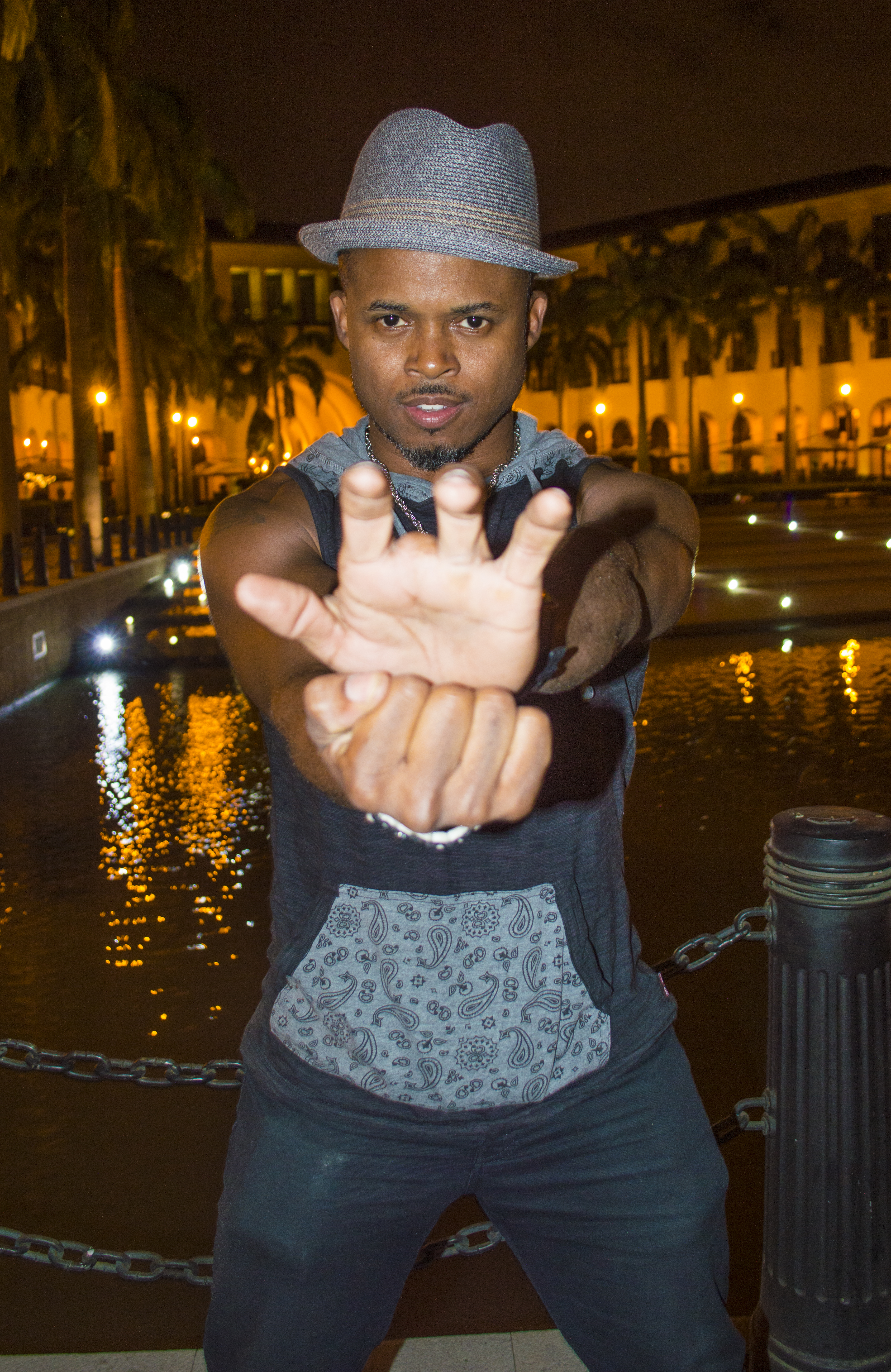 Walter Emanuel Jones con pose de Morphosis en 2016, en Guayaquil, Ecuador.